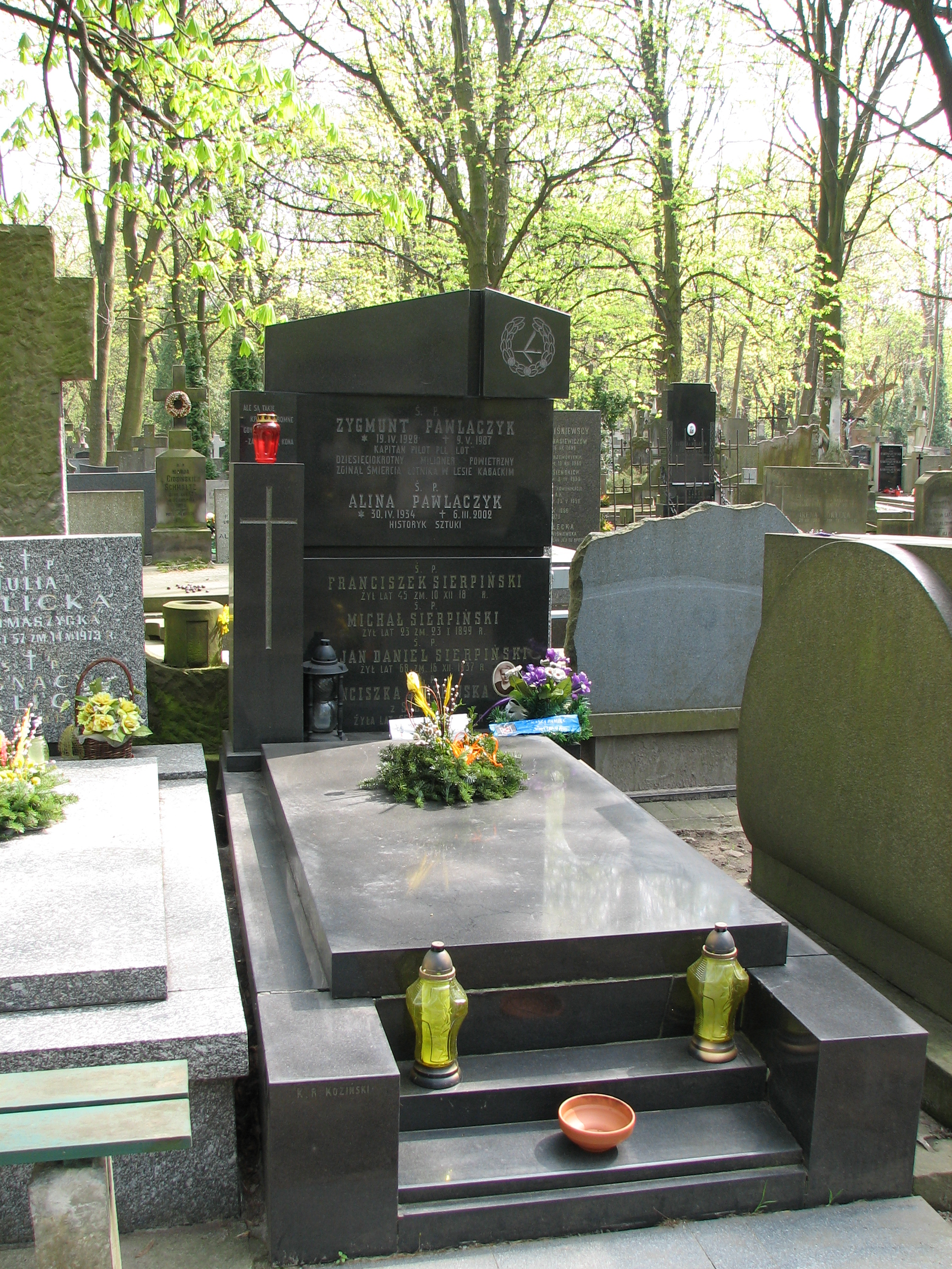 Nagrobek Zygmunta Pawlaczyka - Warszawa, Cmentarz Powązkowski